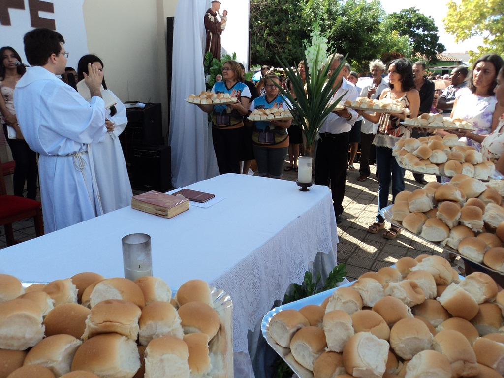 Benção dos Pães - Festa de Santo Antônio